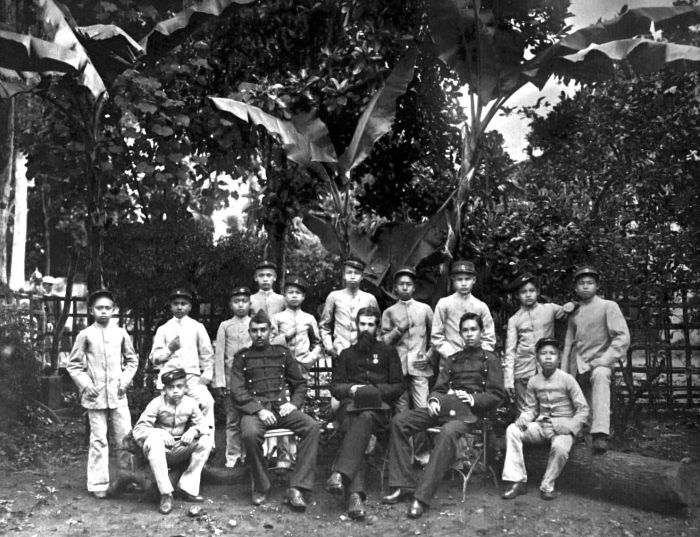 Repronegatief. Tehuis van vader Van der Steur voor verwaarloosde kinderen te Magelang, Java